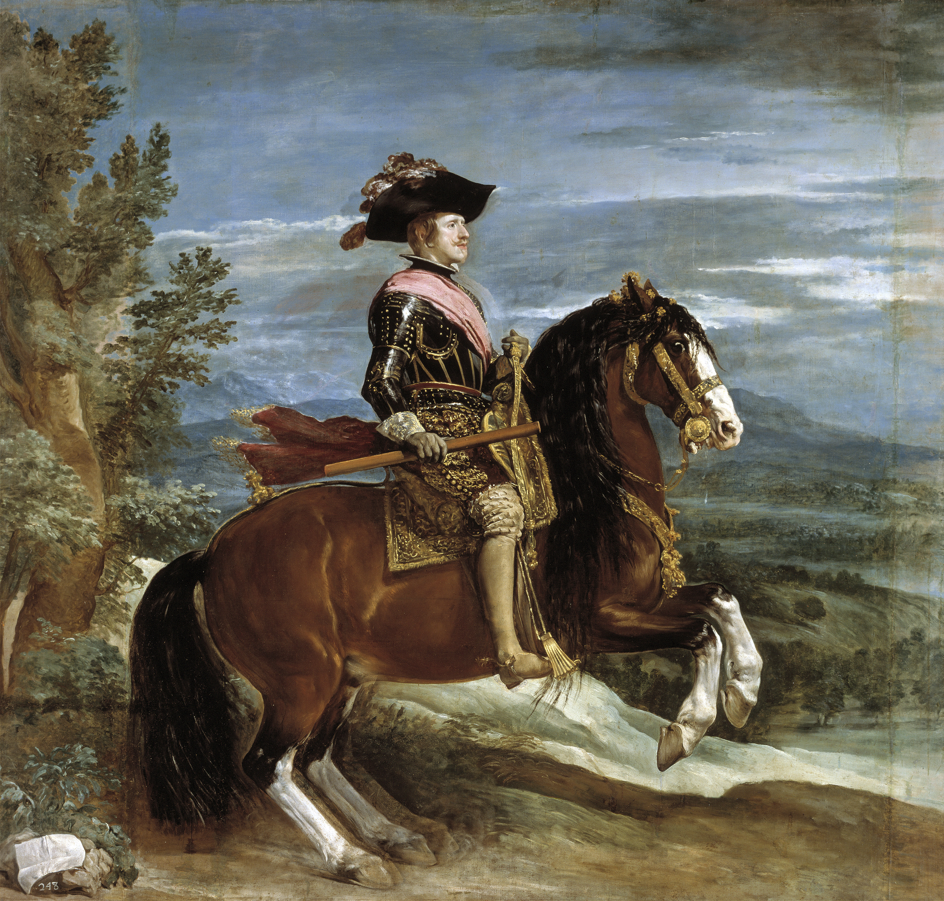 Retrato ecuestre del rey Felipe IV de España (1601-1665), que fue hijo del rey Felipe III de España y de la reina Margarita de Austria.